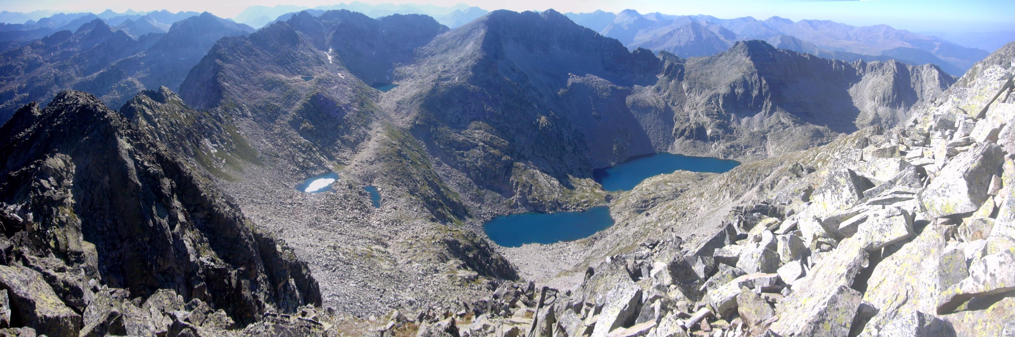 Vall de Comalesbienes vista des la Punta Alta de Comalesbienes; la Vall de Boí, Alta Ribagorça, Catalunya